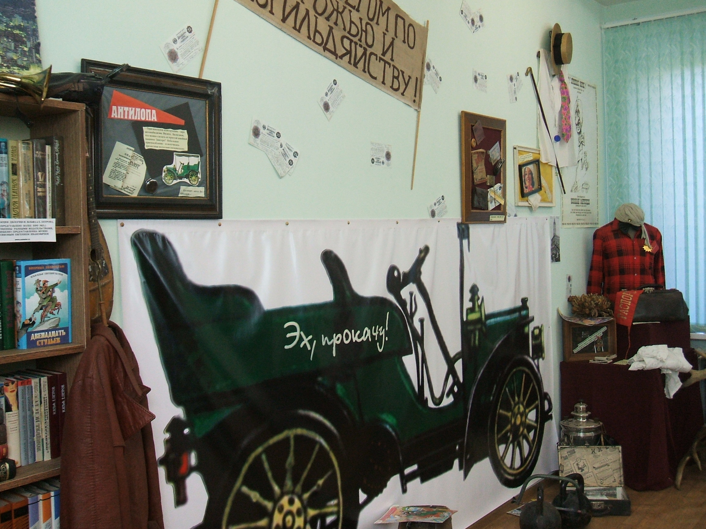 Экспонаты Народного музея Остапа Бендера, г. Сестрорецк